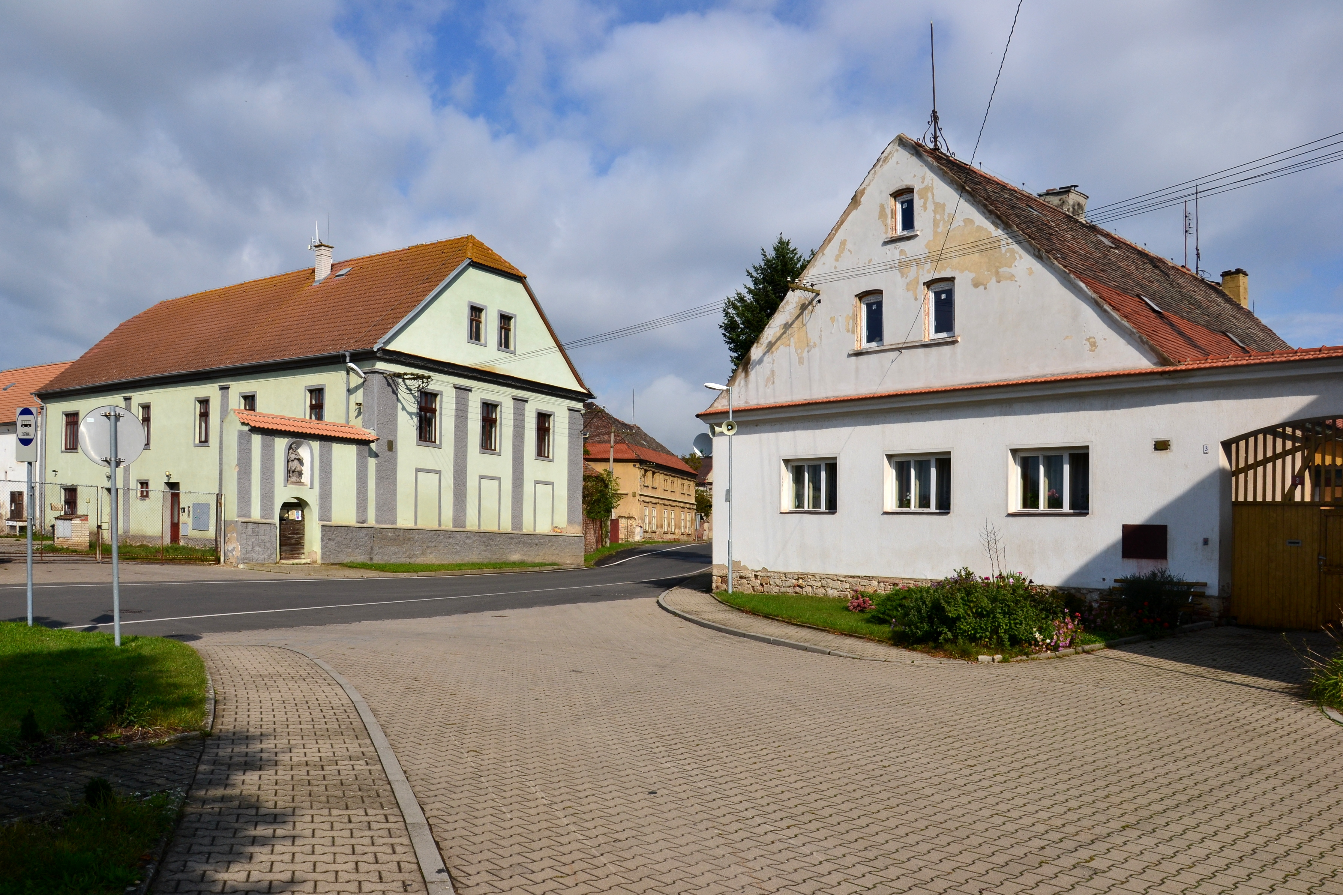 Lažany - domy v severozápadní části návsi